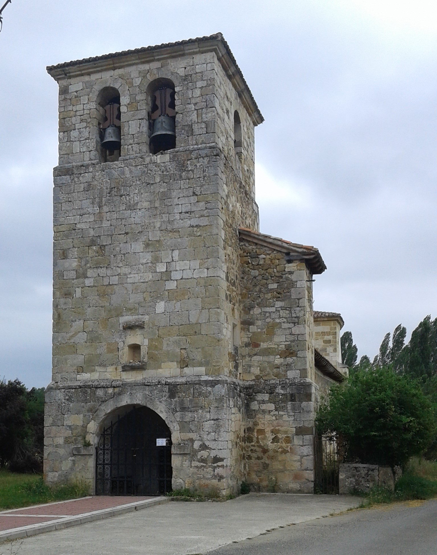 Parroquia románica de la localidad.